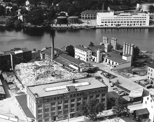 Svenska kolsyrefabriken vid Liljeholmen i Stockholm. I förgrunden syns Beckers byggnad.